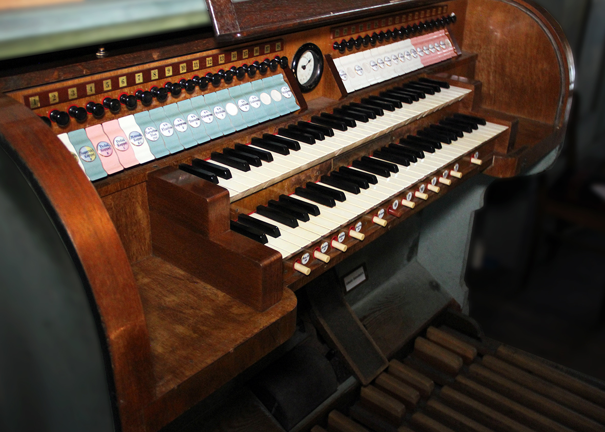 Detailaufnahme des Spieltisches